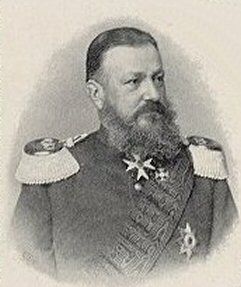 Die Abbildung ist übernommen von und zeigt Fürst Heinrich XXII Reuß ältere Linie. ursprüngliche Quelle